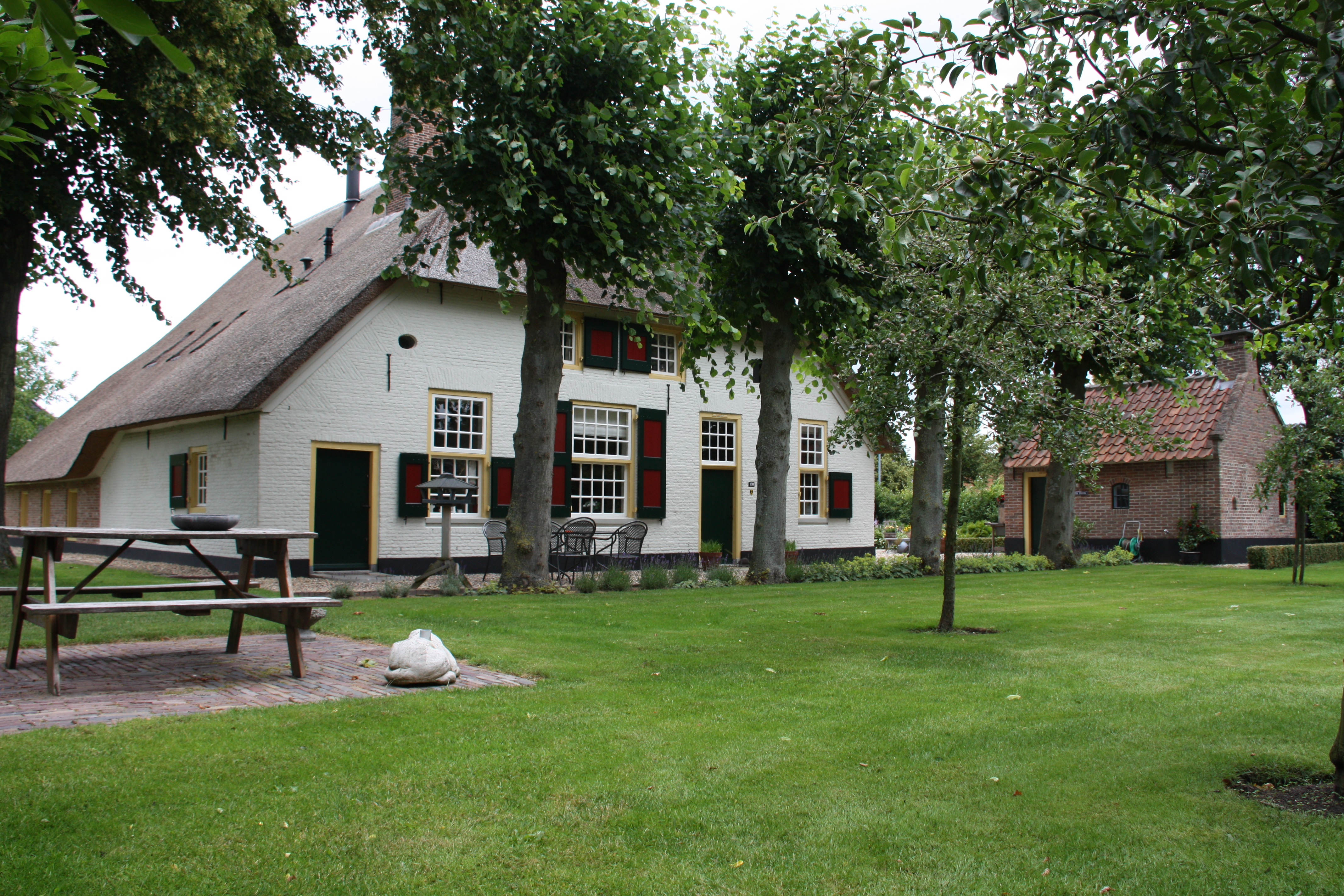 Voorzijde